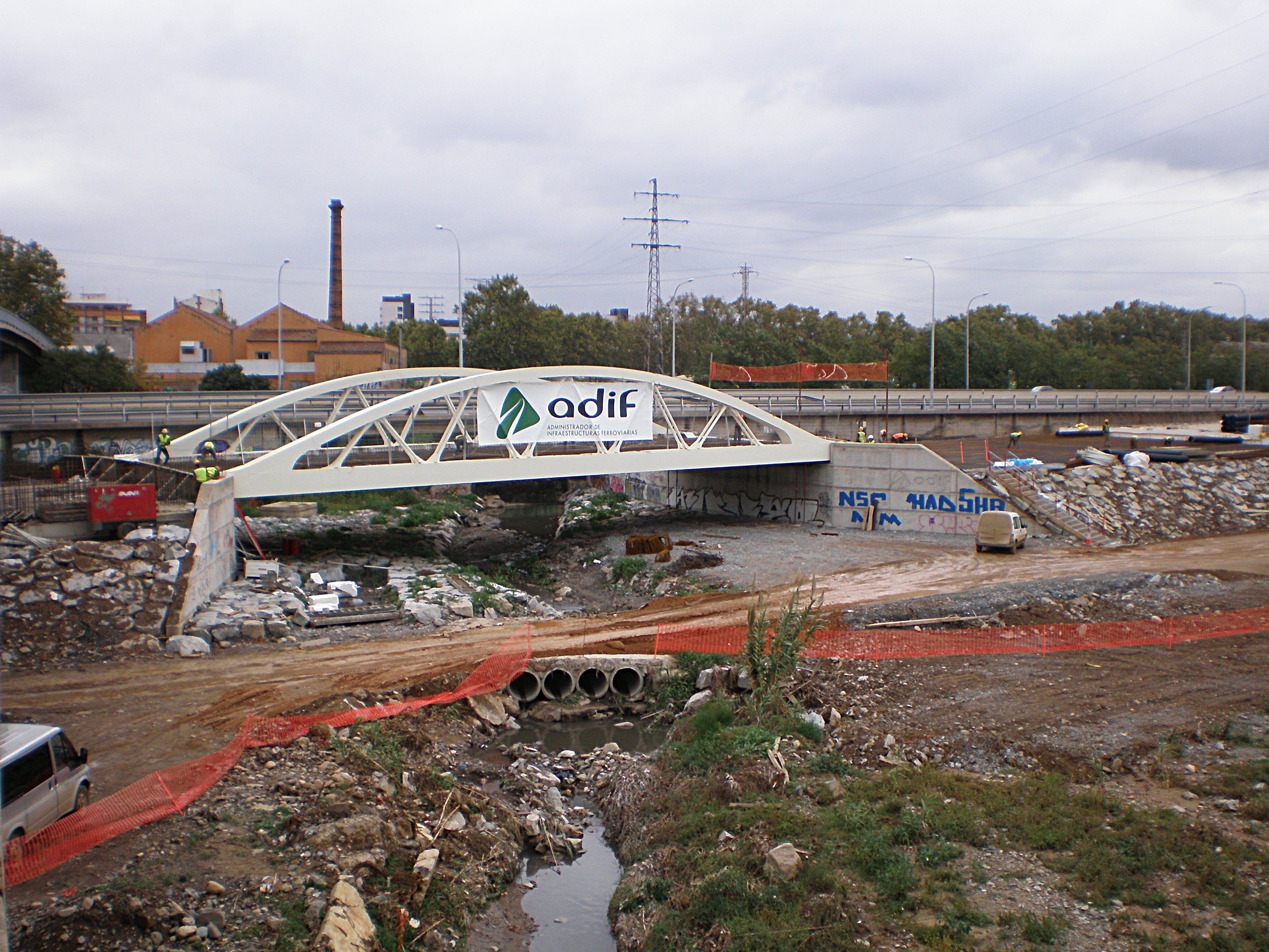 Construcción de la LAV mixta Barcelona - Figueres a su paso por Mollet del Vallès (Vallès Oriental, provincia de Barcelona, Catalunya). Puente sobre el Torrent Caganell en su desembocadura en el Riu Besòs.